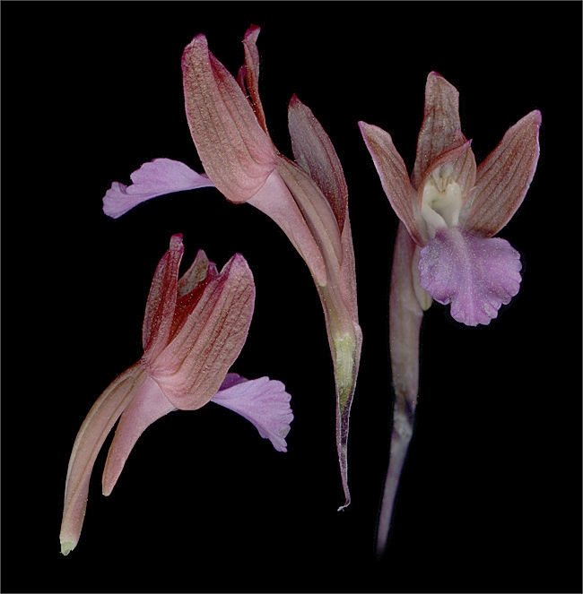 Particolare dei fiori di Anacamptis papilionacea (L.)R.M. Bateman, Pridgeon & M.W. Chase [= Orchis papilionacea L.]. Esemplari fotografati presso l'ANPIL Monte Castellare, San Giuliano Terme (PI)